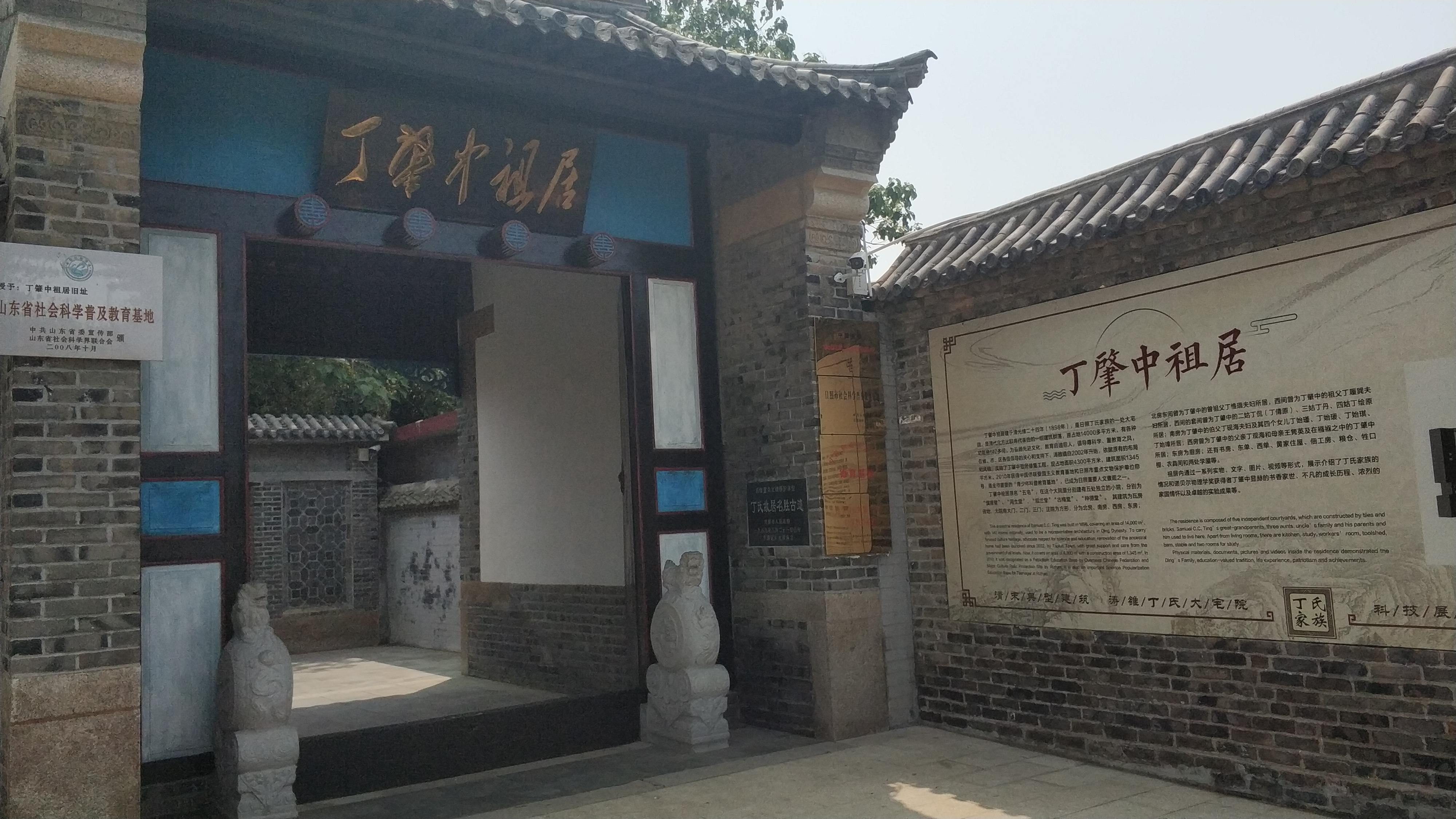 中文（中国大陆）: 位于山东省日照市的丁肇中祖居